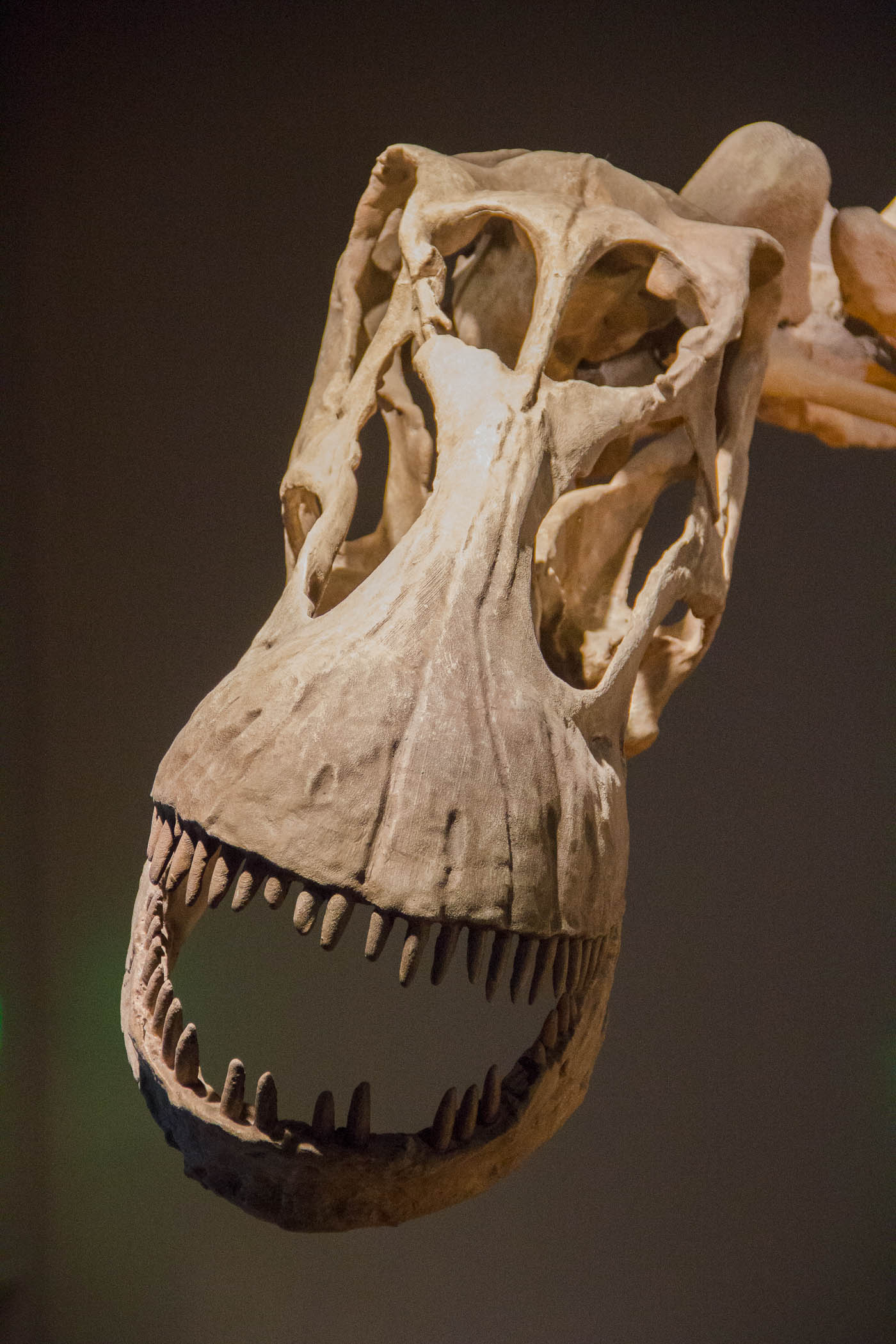 Alamosaurus